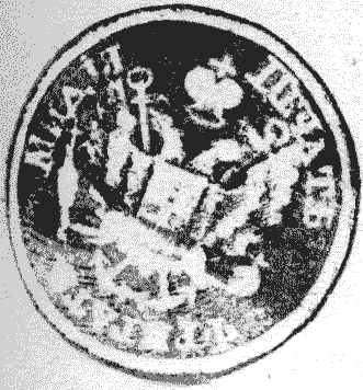 Оттиск печати фрегата Мидия